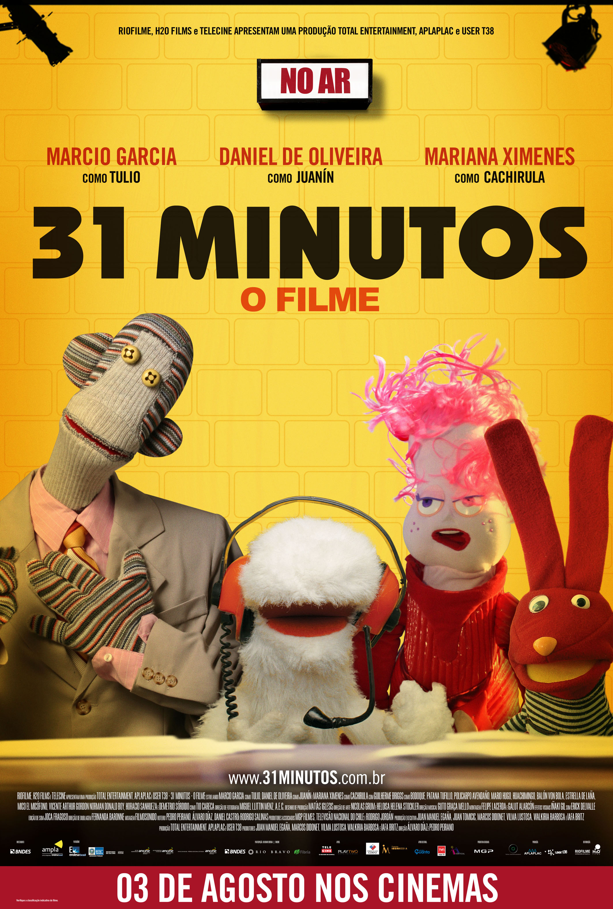 Poster brasileño de 31 minutos, la película.